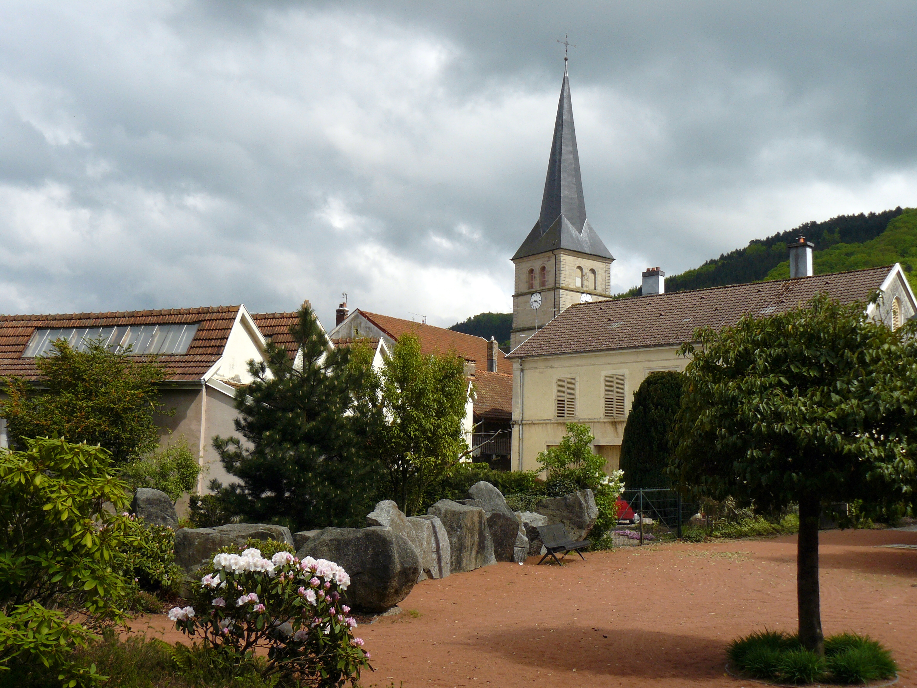 Le Val-d'Ajol : l'église (Vosges, France)